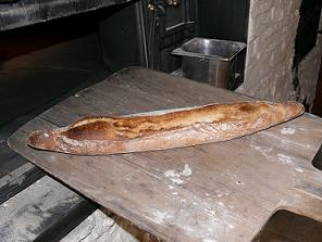 Baguette "Evalbertoise" créée par le boulanger du Four d'Antan à Evette-Salbert (90) en hommage au nouveau gentillé des habitants de la commune.